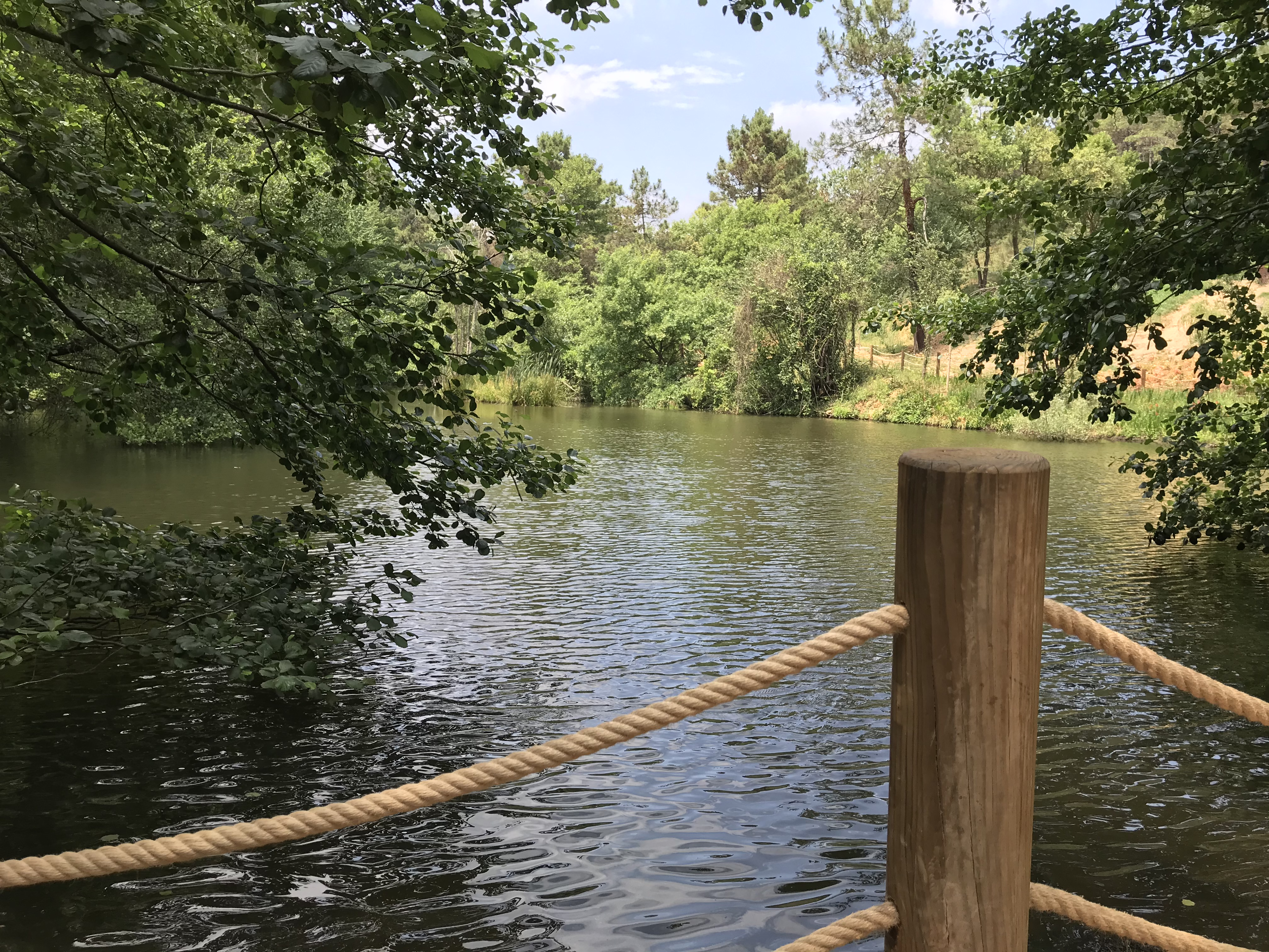 Atatürk Kent Ormanı'ndaki küçük gölet